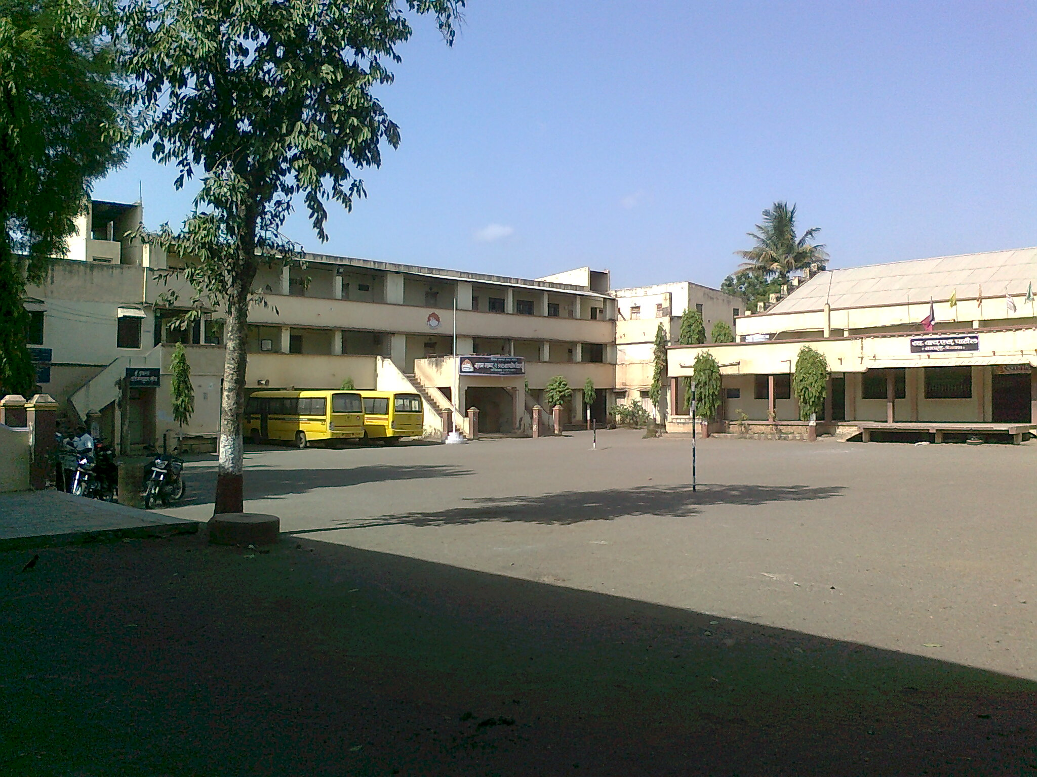 Nutan Madhyamik Vidyalaya, Chinawal village, India